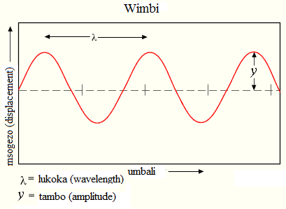 Kiswahili: Wave.png - imeswahilishwa